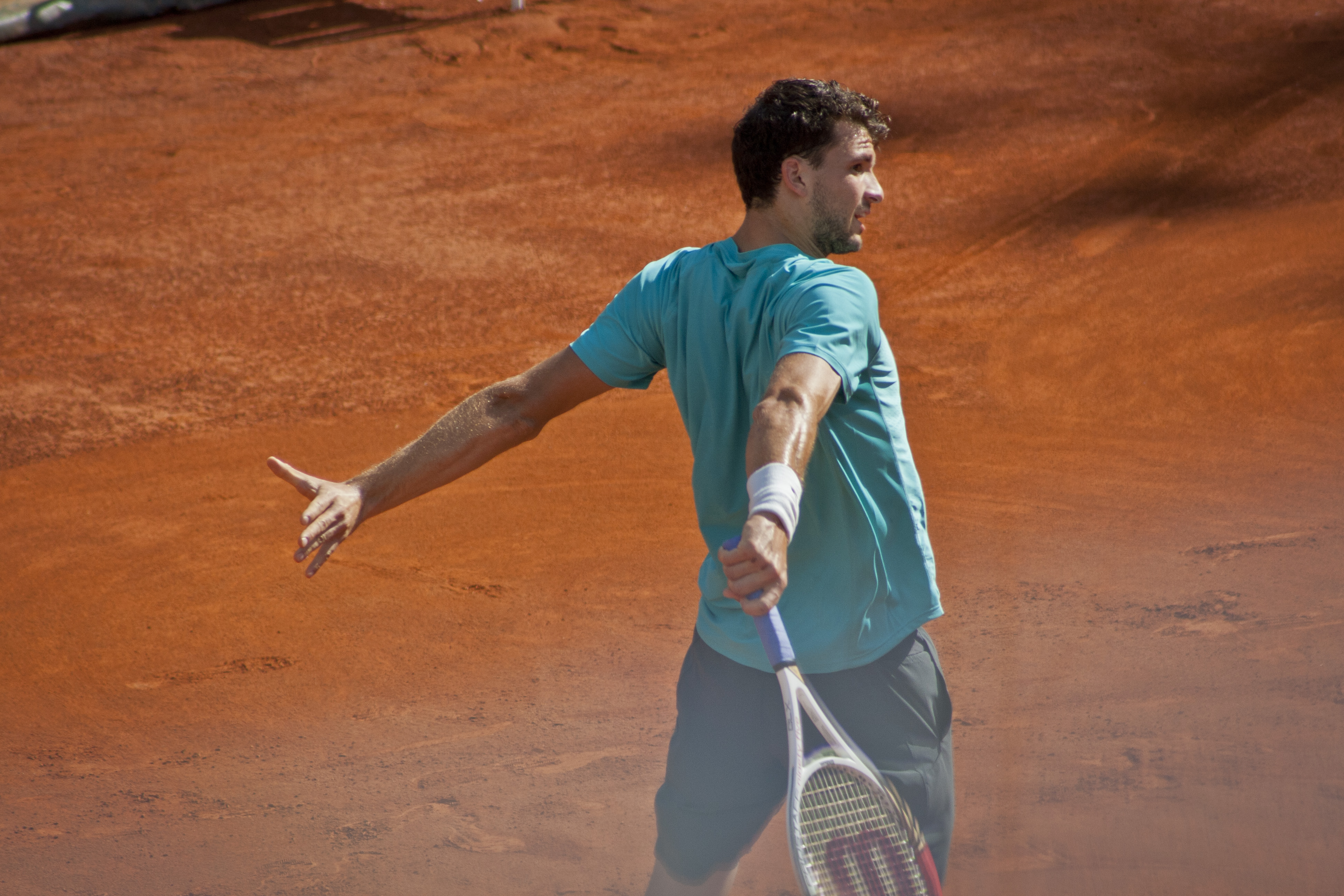 2013 Internazionali BNL d'Italia - Grigor Dimitrov vs Márcos Baghdatís (1st round)